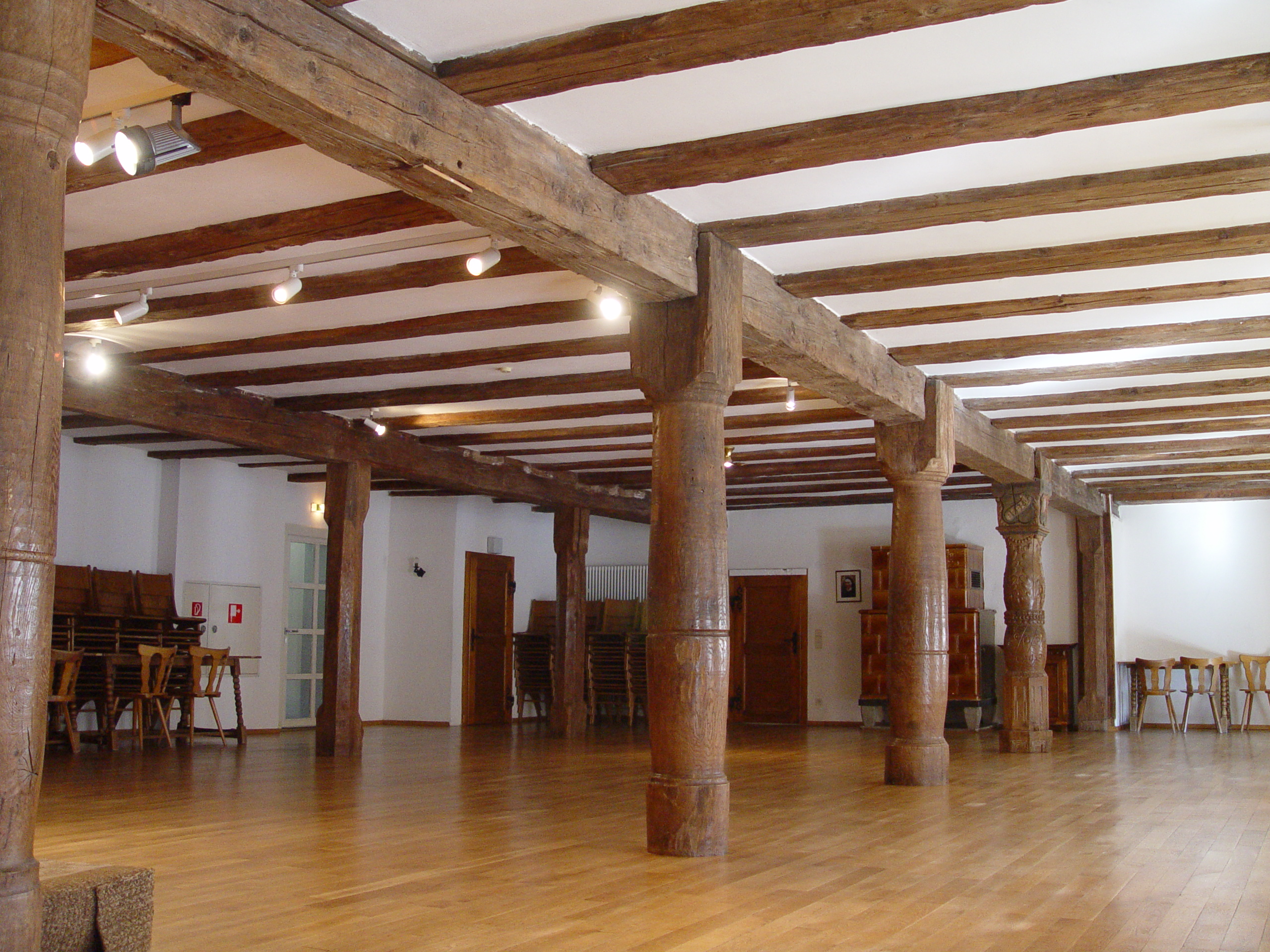 Der sogenannte "Jenner" im Kloster Wald, Baden-Württemberg, Deutschland